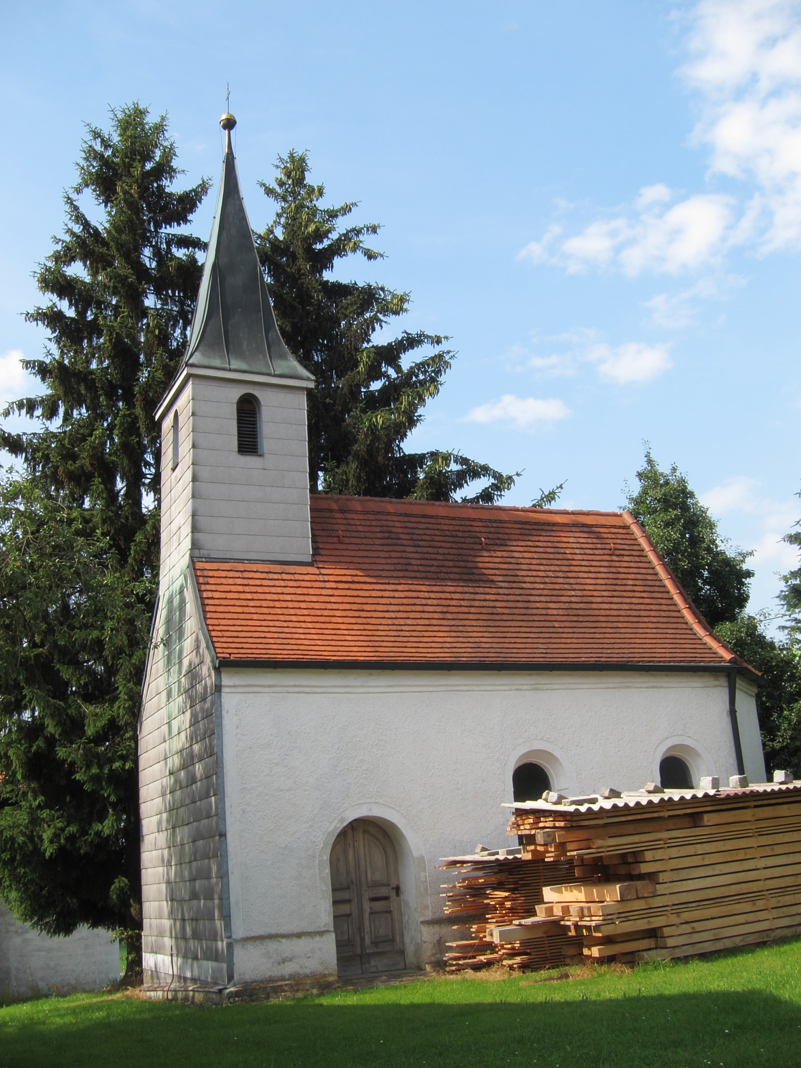 Oberschiltern 3; katholische Kapelle St. Kastulus, kleiner Saalbau mit Dachreiter in spätgotischem Stil, erbaut 1625.